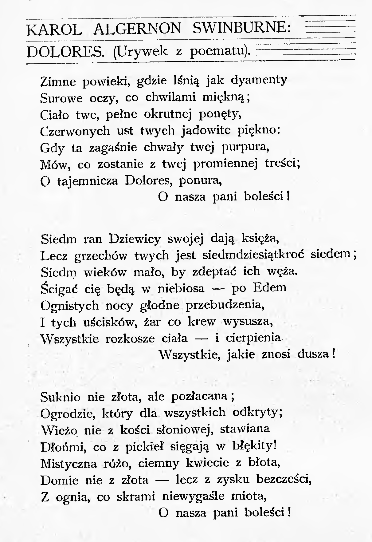 skan z czasopisma PL Tytuł : Życie. R. 3 (1899) Wydawca i redaktor: Stanisław Przybyszewski Miejsce wydania: Kraków; Lwów Data wydania : 1897 Opis : Czasopismo literacko-artystyczne krakowskich modernistów. - Tyg. - Podtyt.: tygodnik illustrowany, literacki, artystyczny, naukowy i społeczny. - Lit.: Krakowskie „Życie” pod redakcją Stanisław Przybyszewskiego (1899-1900). w wyborze ujęto tylko utwory autorów będących w PD